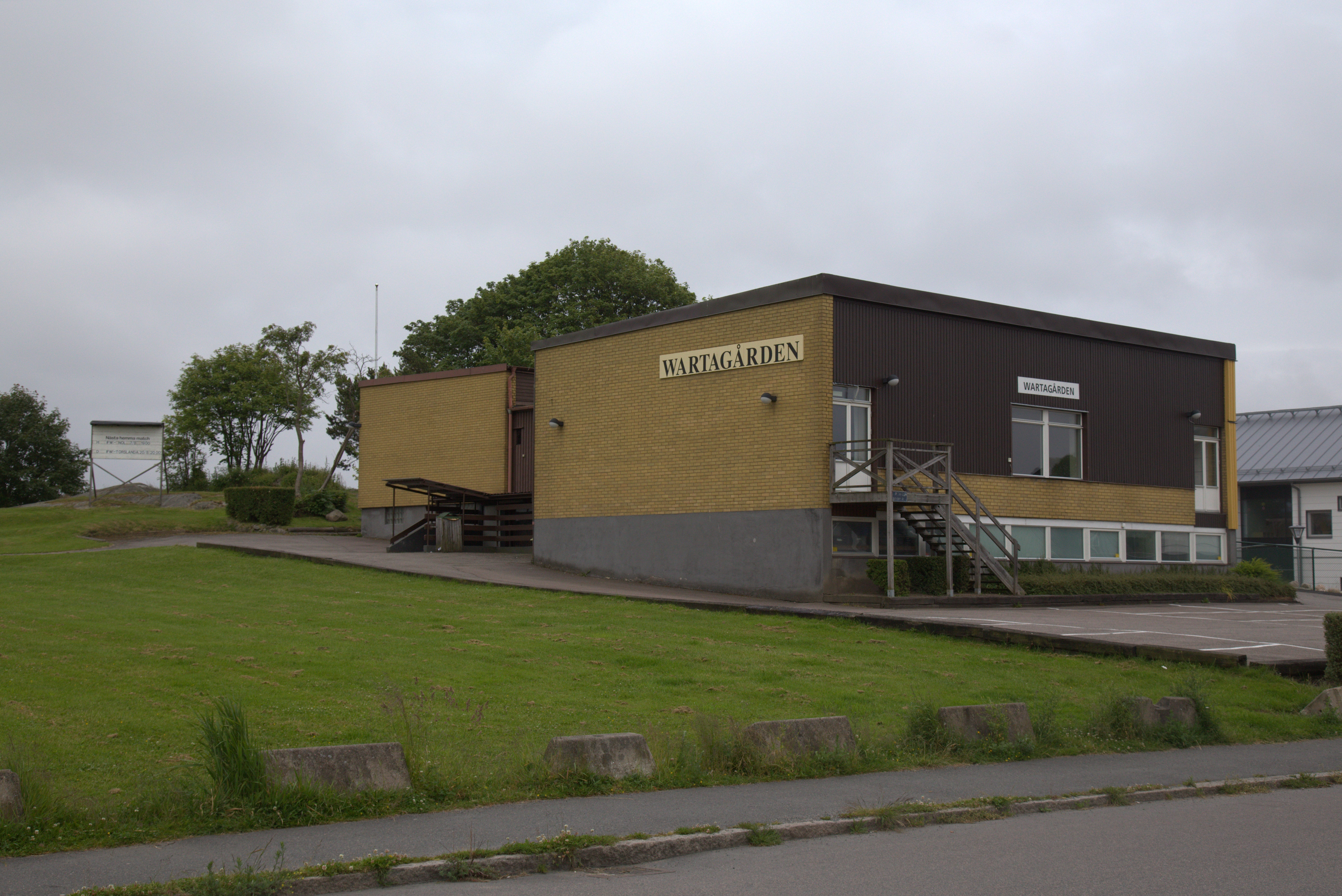 Wartagården på Södra Sälöfjordsgatan 29 på Hisingen.